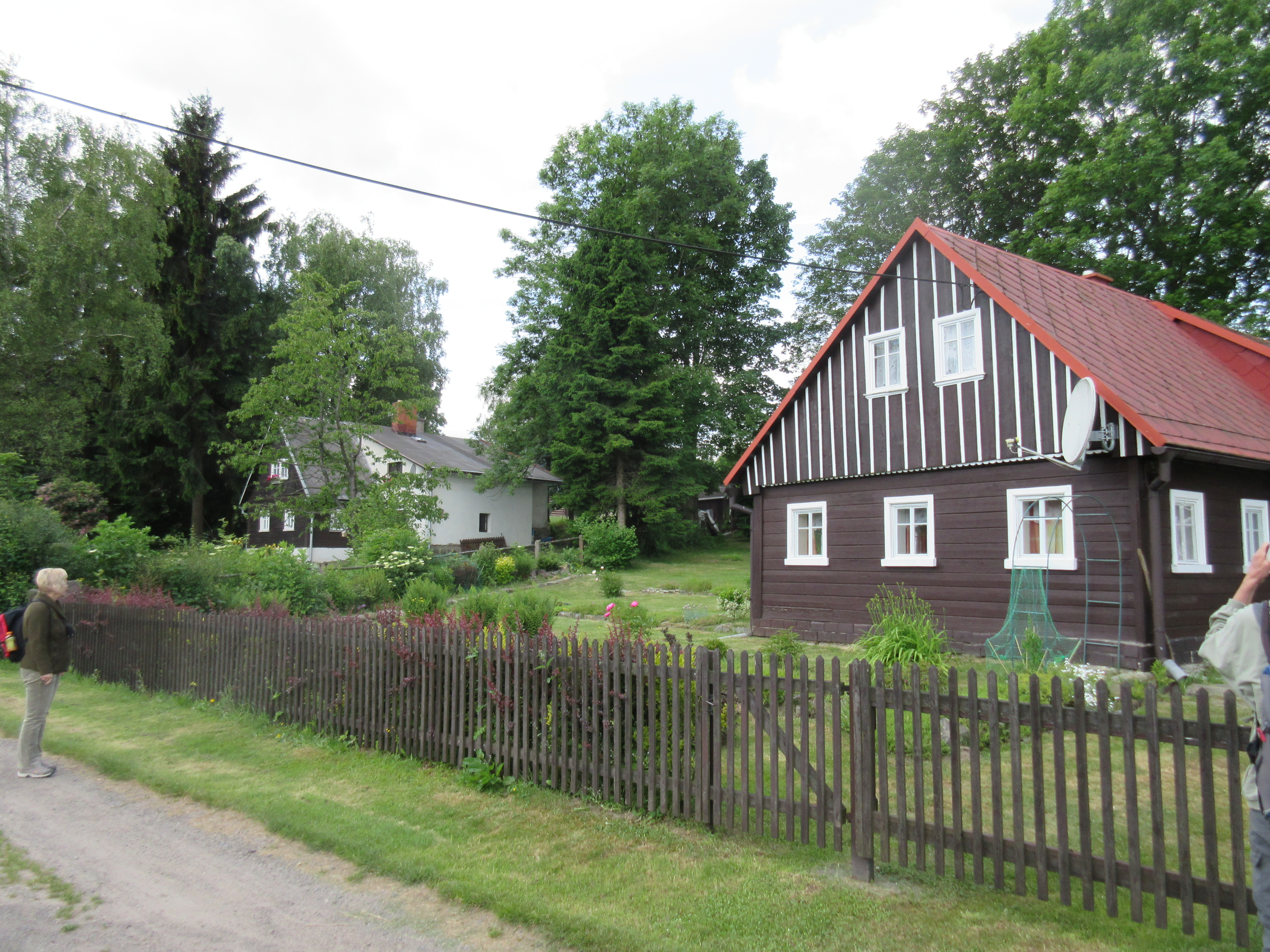 Valy jsou odloučenou částí obce Krompach, zde jedno z mnoha stavení